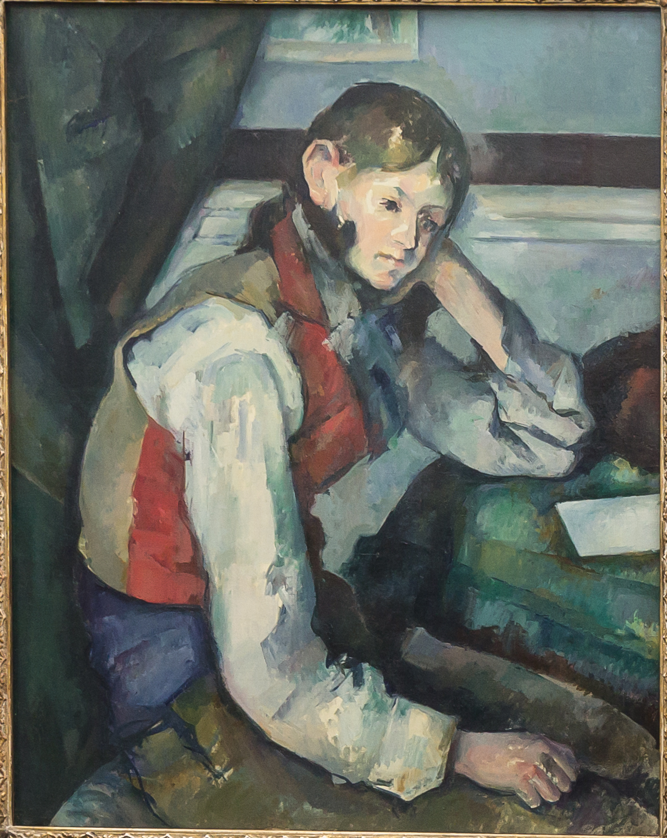 Foto: Hängung des Gemäldes „Der Knabe mit der roten Weste" von Paul Czanne (1888/90, Öl auf Leinwand, Stiftung Sammlung E.G. Bührle, Zürich)